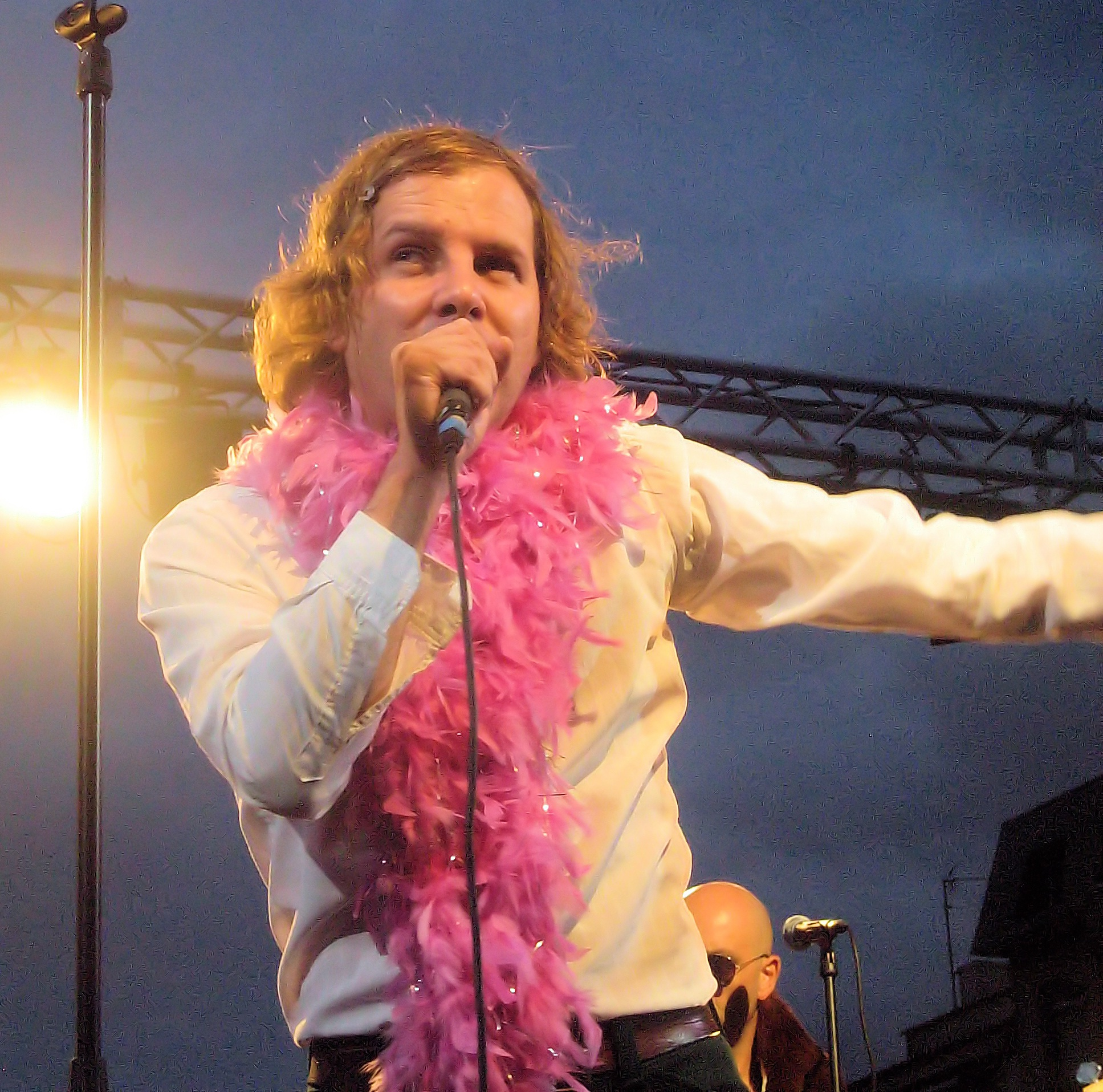 Le chanteur Philippe Katerine, en concert. Fête de la Musique - 21 juin 2006 Les Sables d'Olonne, Vendée, France.